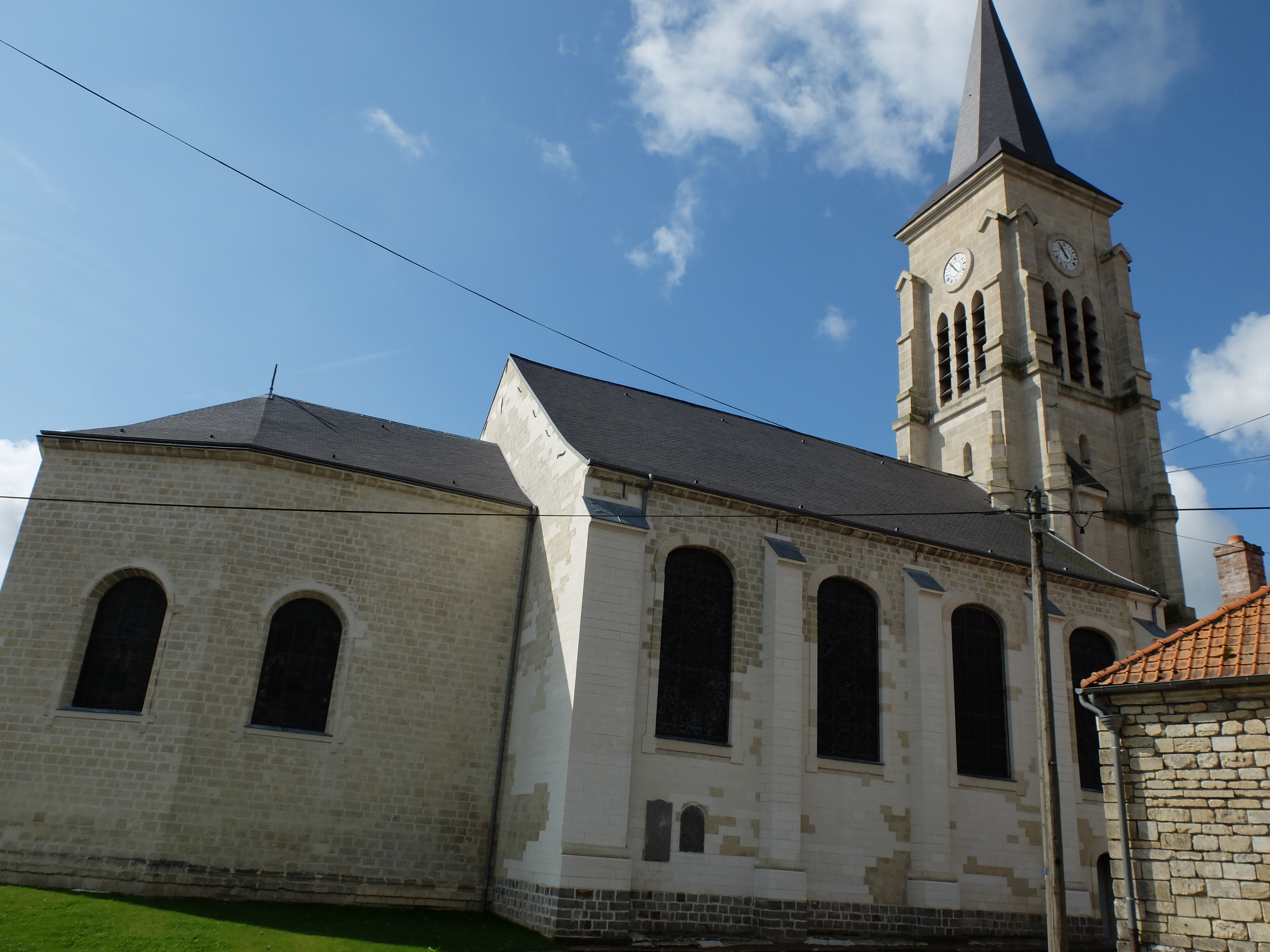 Vue de l'église Saint-Aubert d'Avesnes-le-Sec.